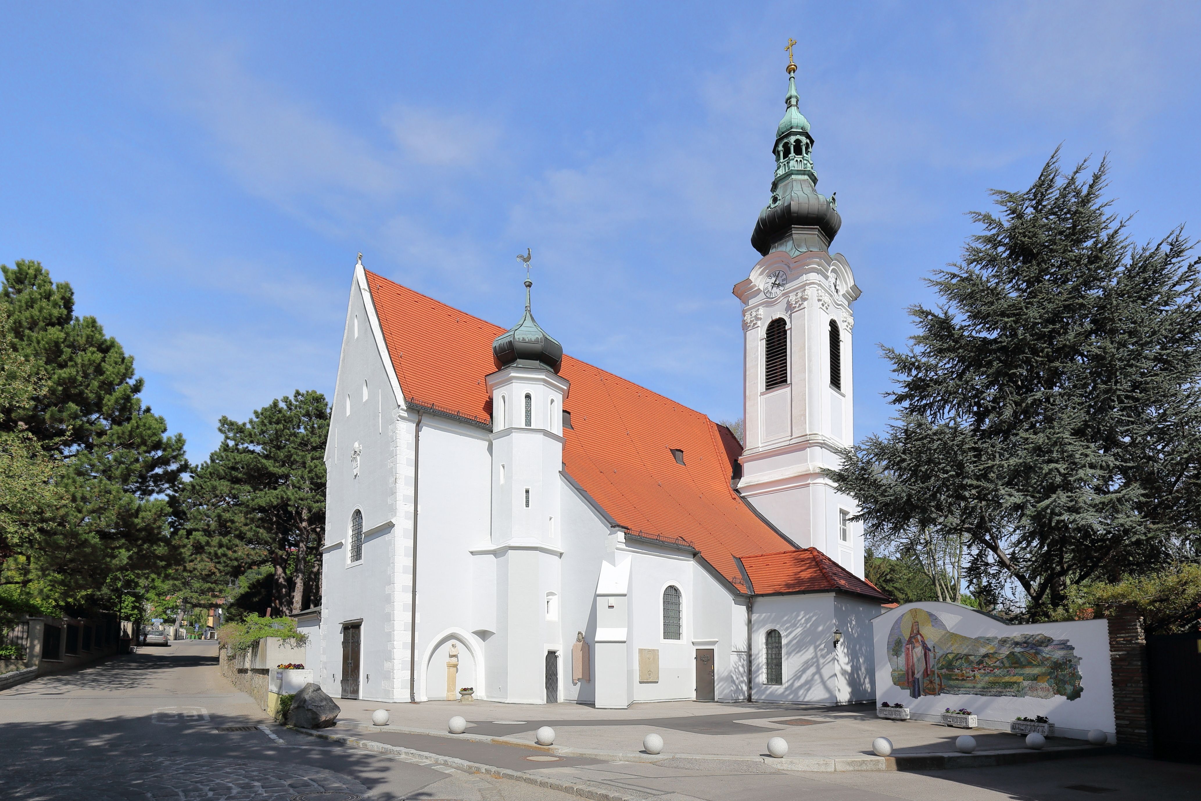 Die Südwestansicht der katholischen Pfarrkirche hl. Katharina in der niederösterreichischen Marktgemeinde Langenzersdorf.